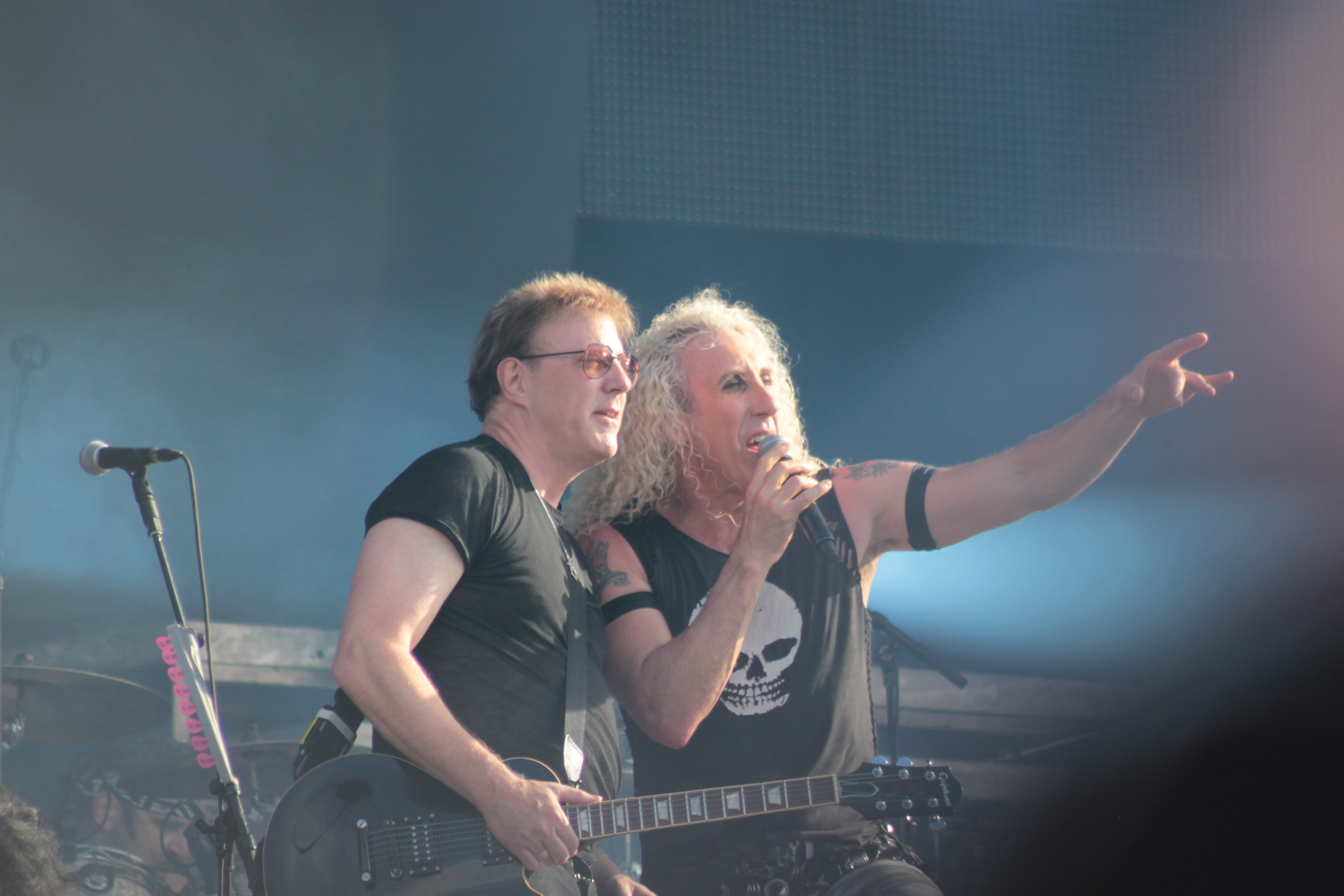 Jay Jay French, Dee Snider, Twisted Sister, Hellfest 2013, Fr-44-Clisson.